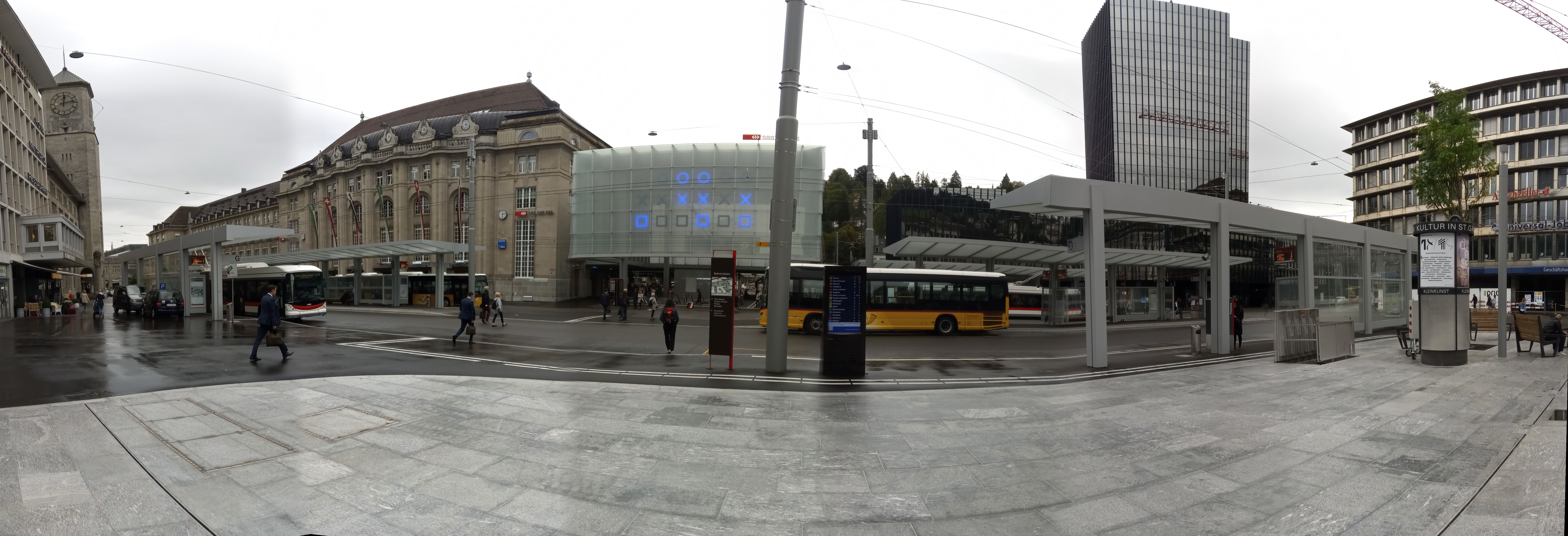 Panorama des Fertig gestellten Bahnhofplatzes St. Gallen vom Kornhausplatz aus gesehen. Links das Bahnhofgebäude, Mitte links die neue Ankunftshalle, halbrechts Rathaus,linker Rand: Hotel Metropol